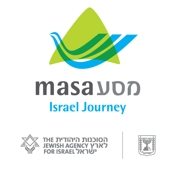 לוגו פרויקט מסע